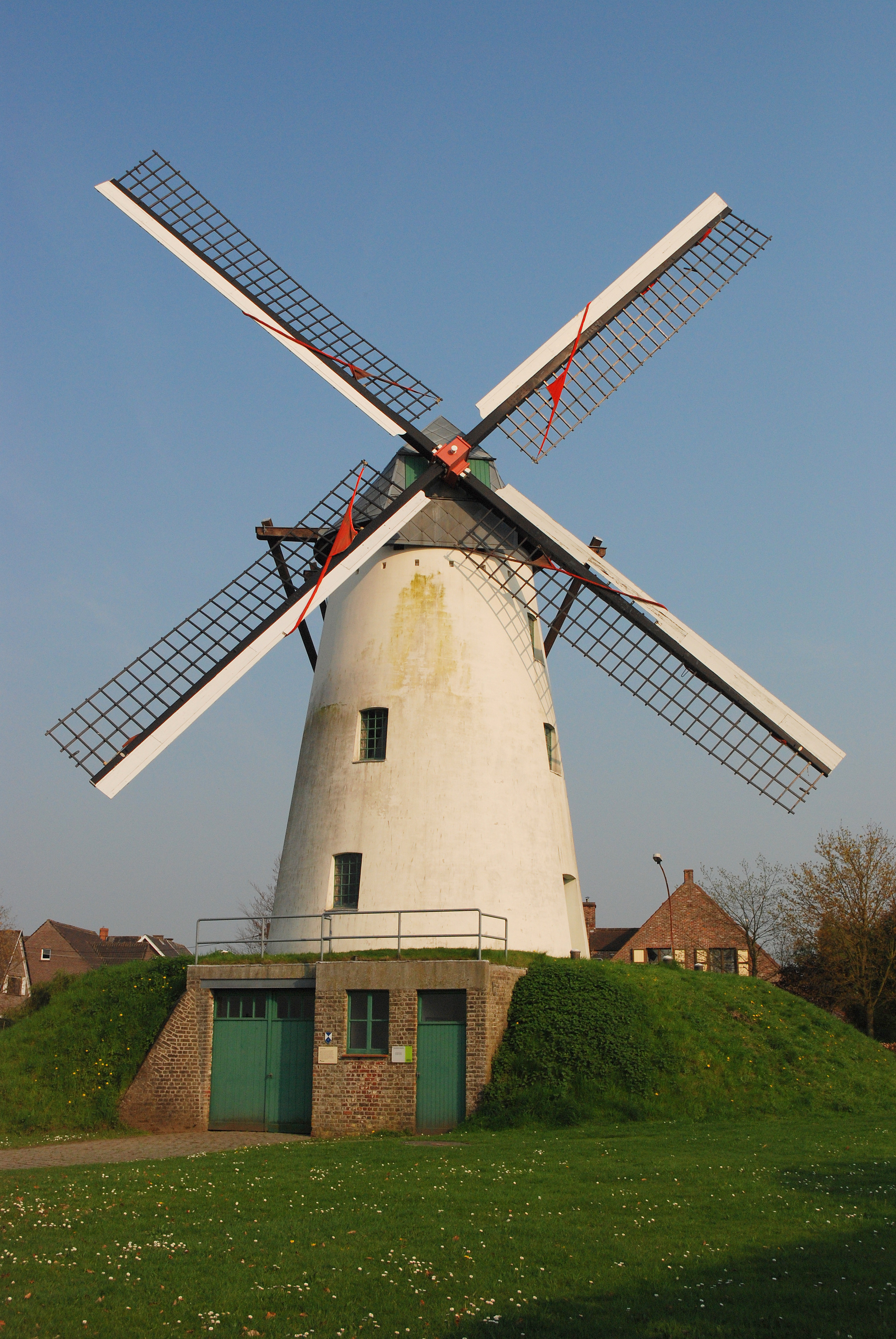 De Schelderomolen in Schelderode, België